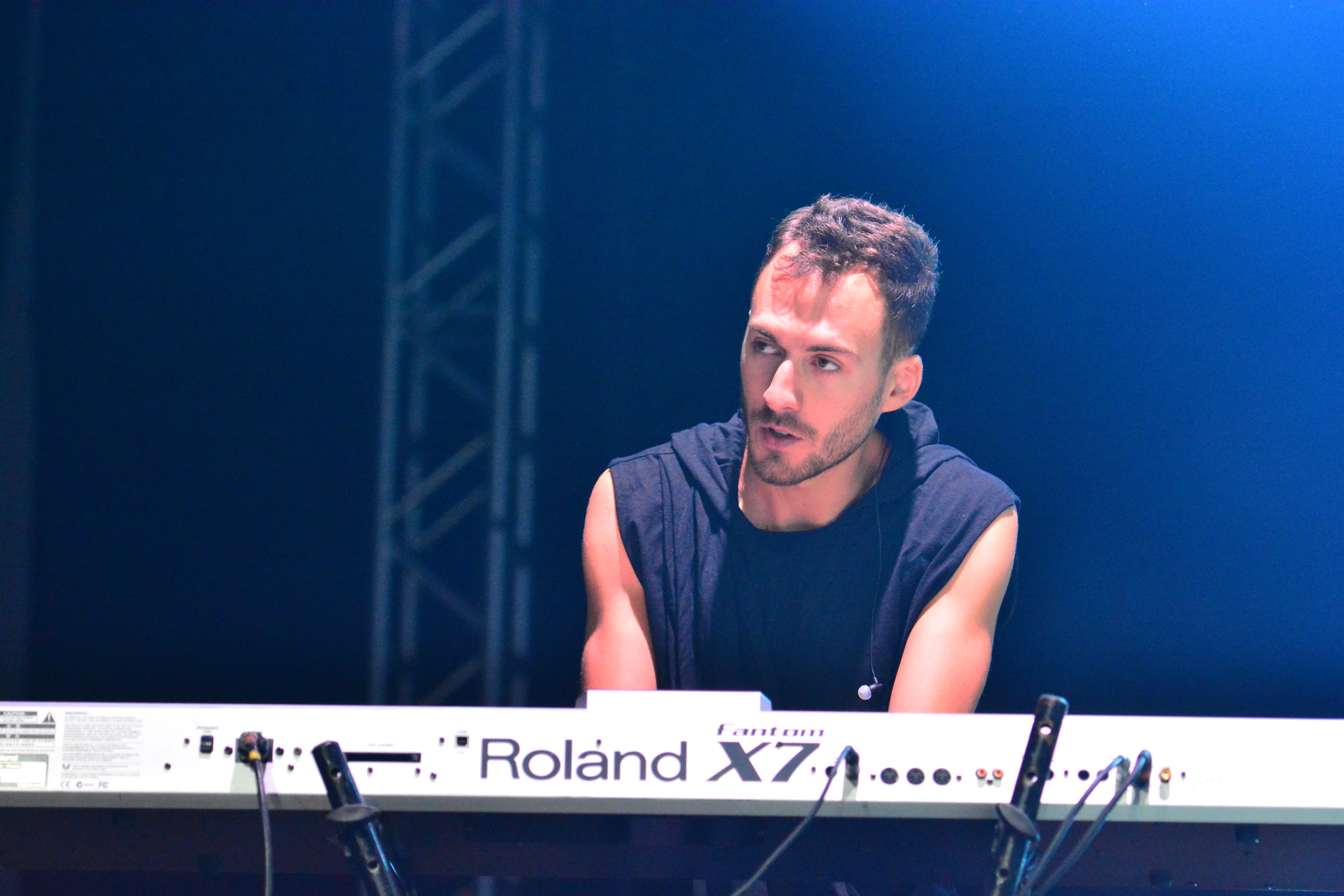 Ancient Bards beim Wacken Open Air 2015